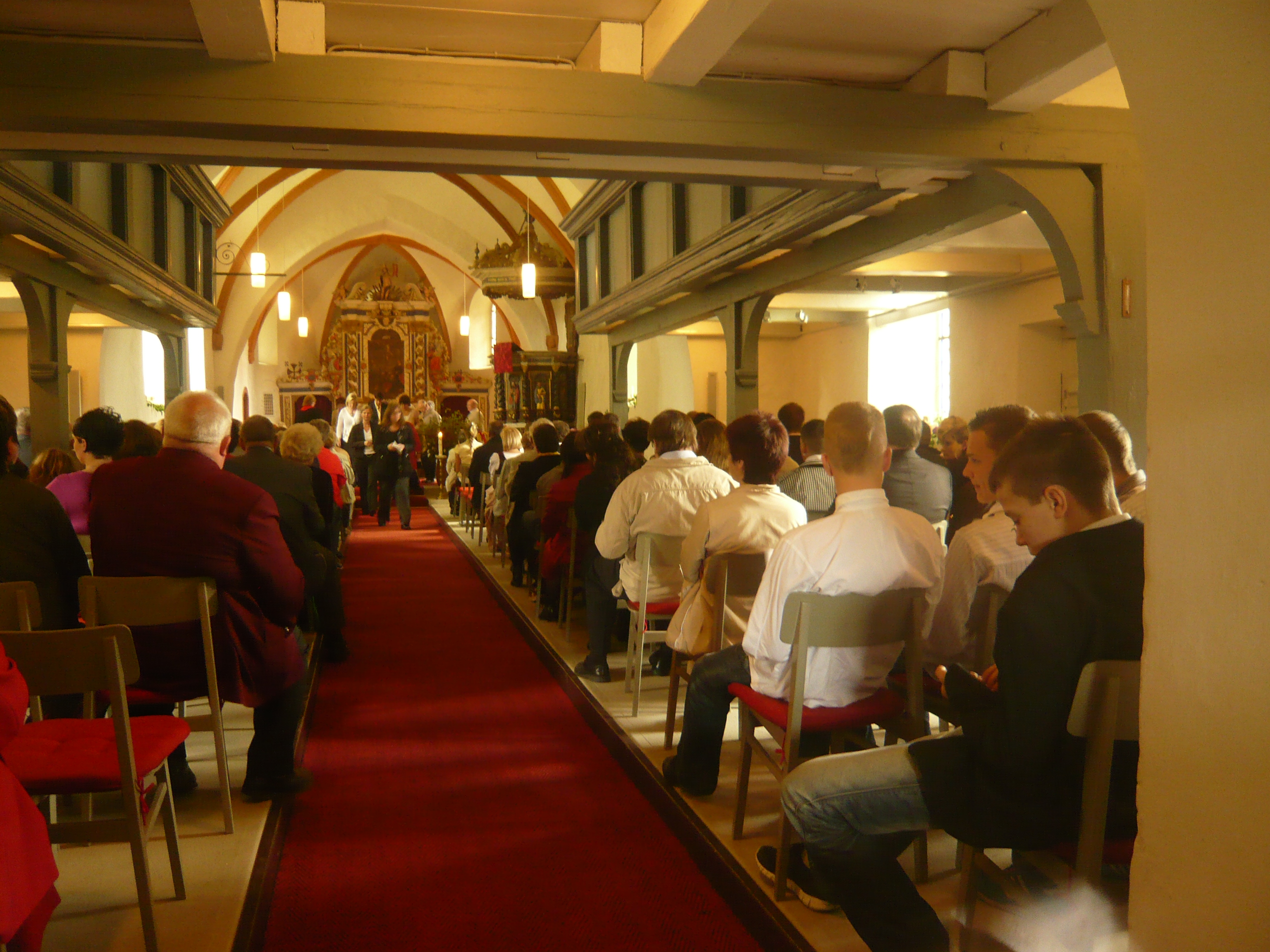 Gemeinde Wandlitz, Ortsteil Klosterfelde, Kirche innen